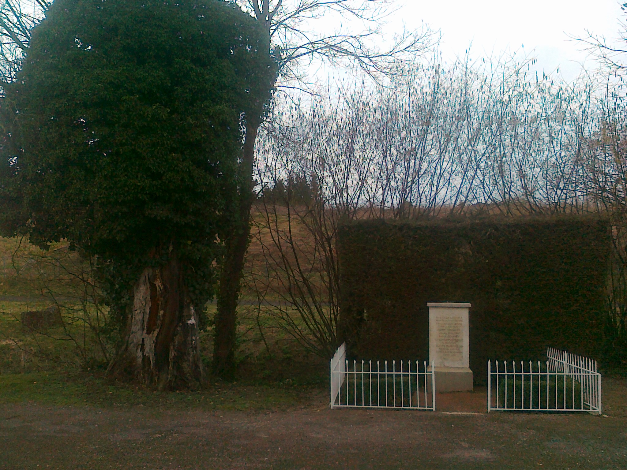 Le vieux chêne commémoratif de la seconde guerre mondiale, Chevigny-Saint-Sauveur, Bourgogne, FRANCE